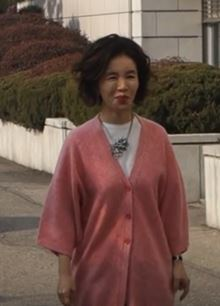 2일 오전 서울시 영등포구 여의도동 KBS 별관에서 KBS2 '해피투게더4' '하나뿐인 내편' 특집 녹화가 진행돼 유이, 나혜미, 박성훈, 임예진이 참석했다.